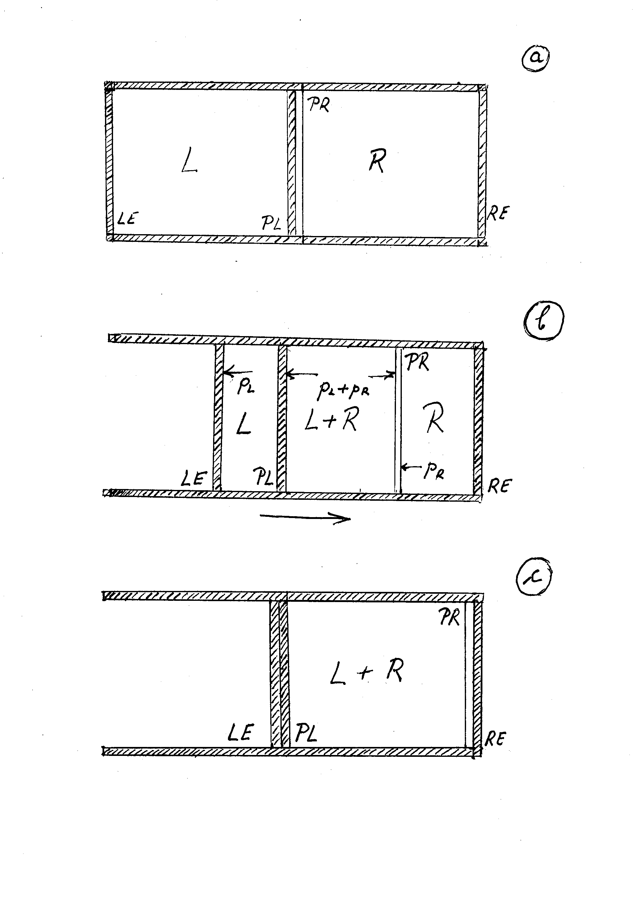 Amestec Gibbs